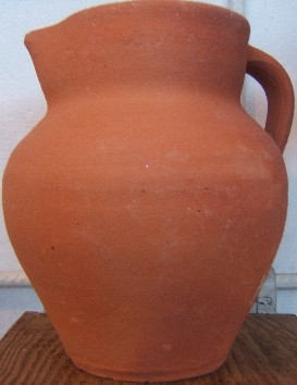 Jarra sin vidriar. Alfarero de Chinchilla del Siglo XX. Museo de Cerámica de Chinchilla de Monte-Aragón (Albacete).